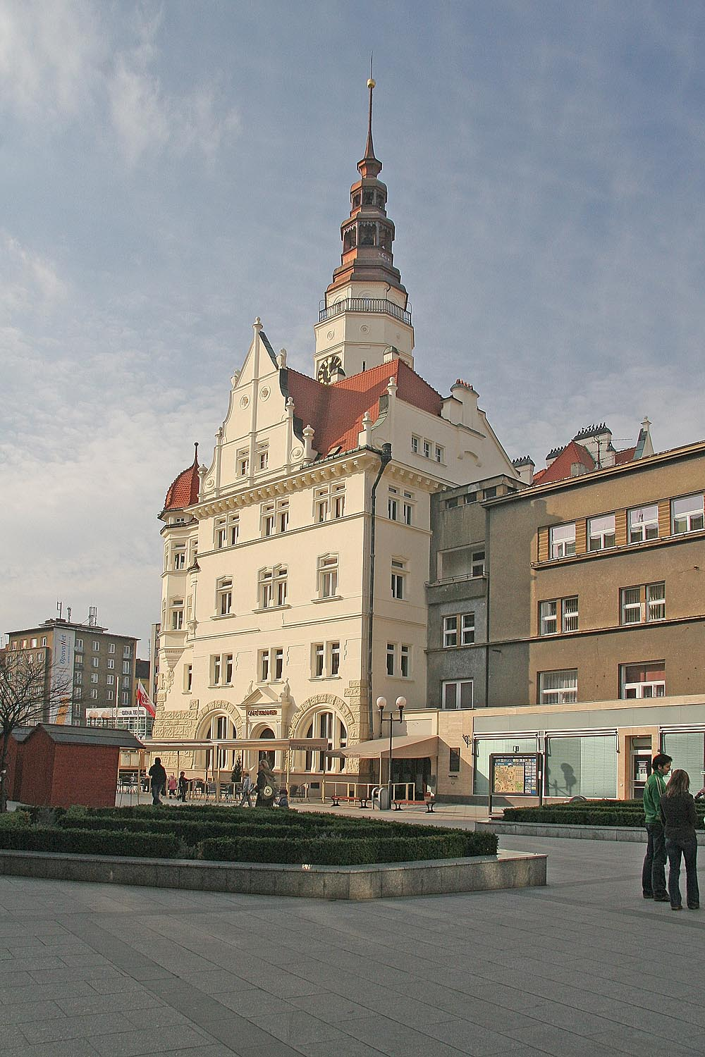 radnice v Opavě, district Opava, Czech Republic